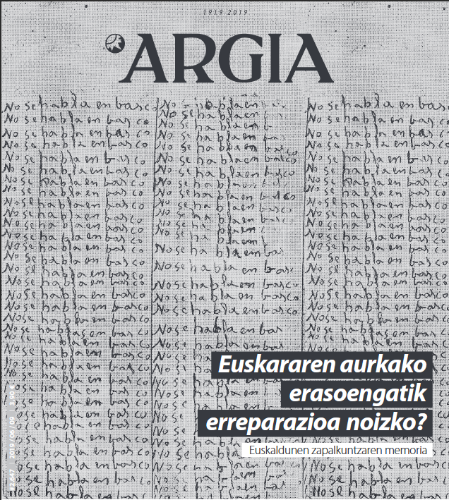 Argia aldizkariaren 2.647 zenbakiaren azalaren zati bat. 2019ko ekainaren 9an argitaratua.